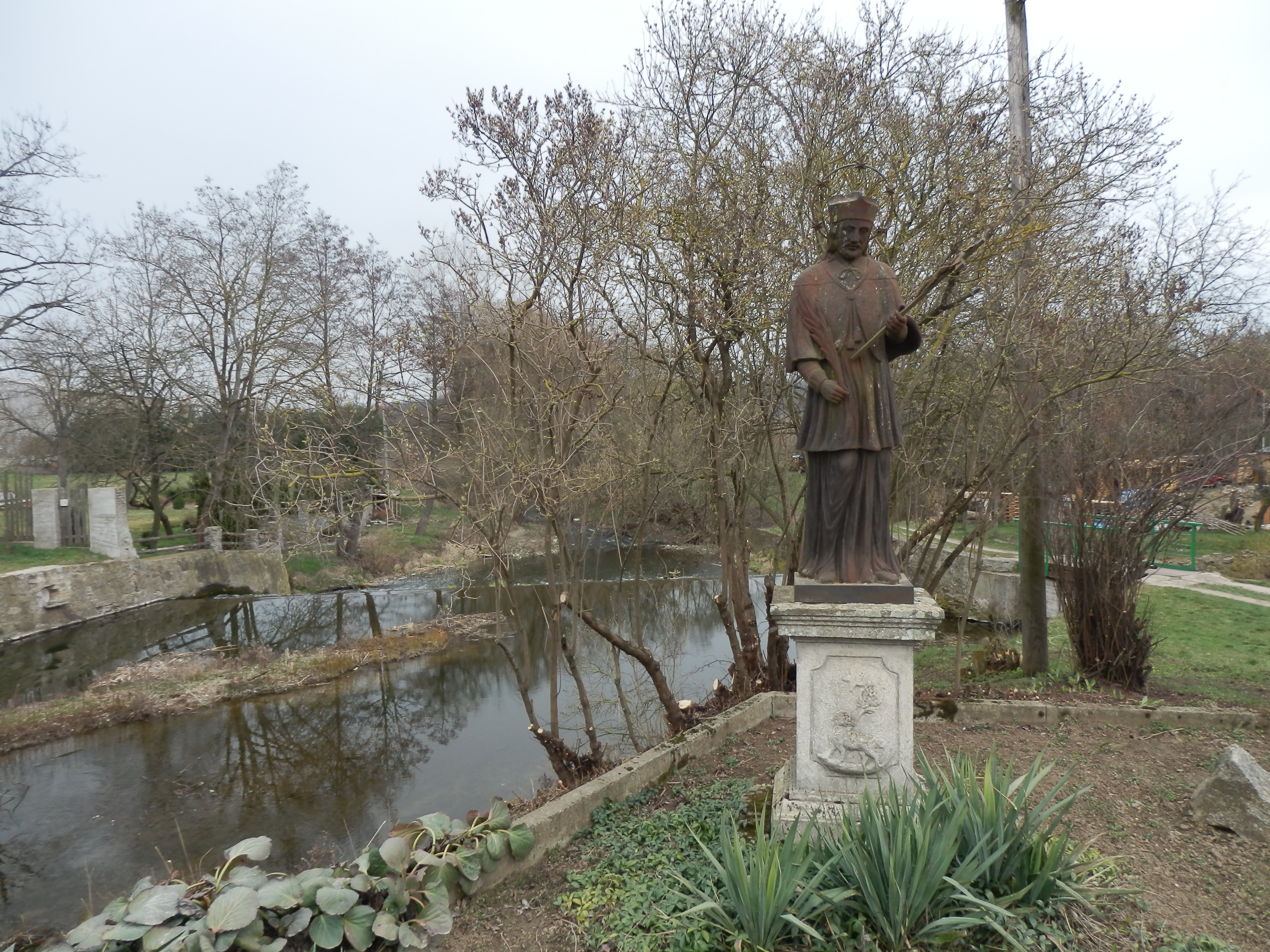 Socha svatého Jana Nepomuckého, za vsí, Tvořihráz.